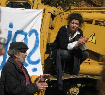 Sabine Macht und der international renommierte Glaskünstler Erwin Eisch bei der Demo in Frauenau am 20.4.2008